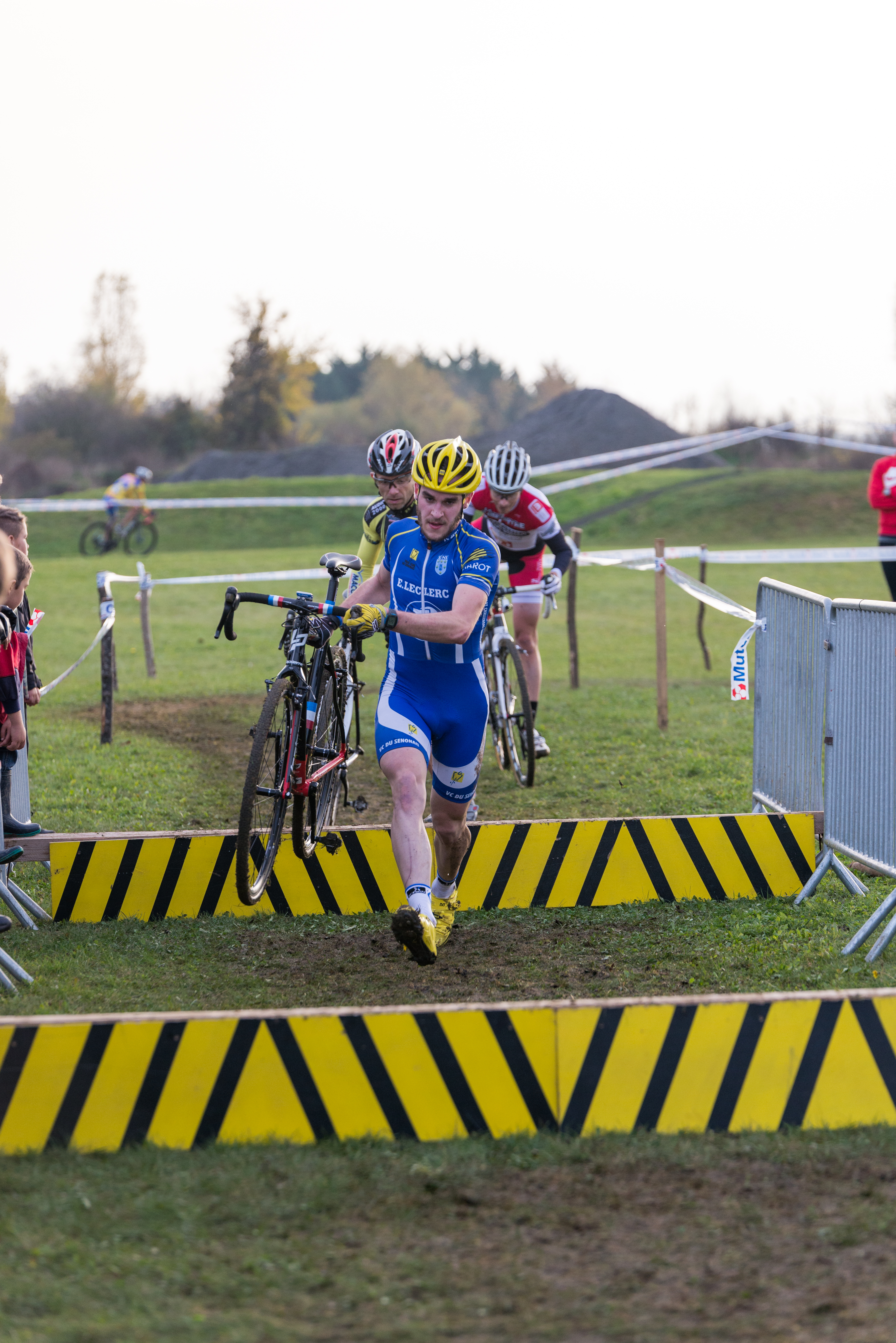 27ème cyclo-cross international de Dijon (Côte d'Or, France).